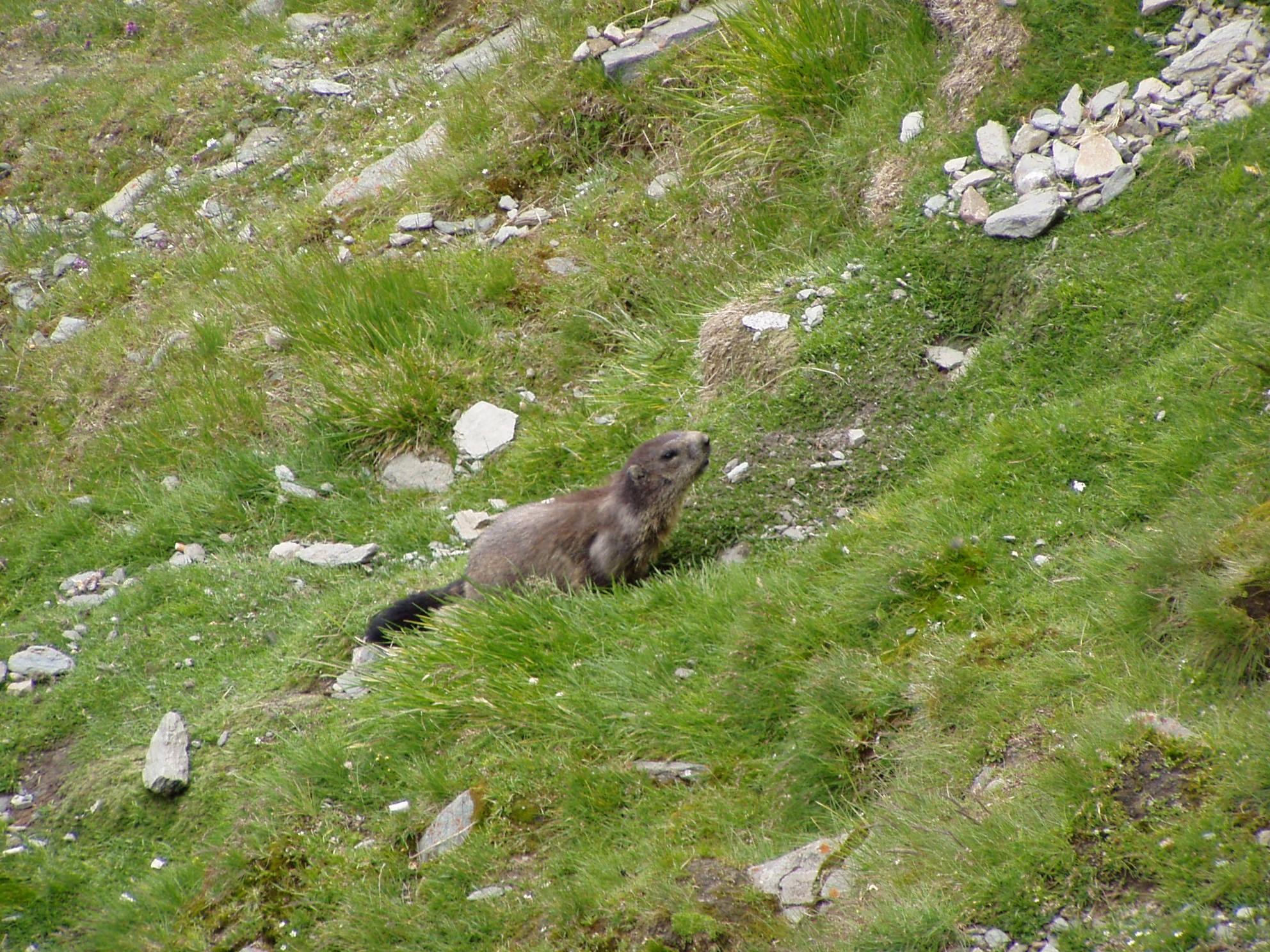 Photographie d'une marmotte prise depuis la Franz-Josephs-Höhe sur la route du Grossglockner en juillet fr:2006 par Accrochoc.